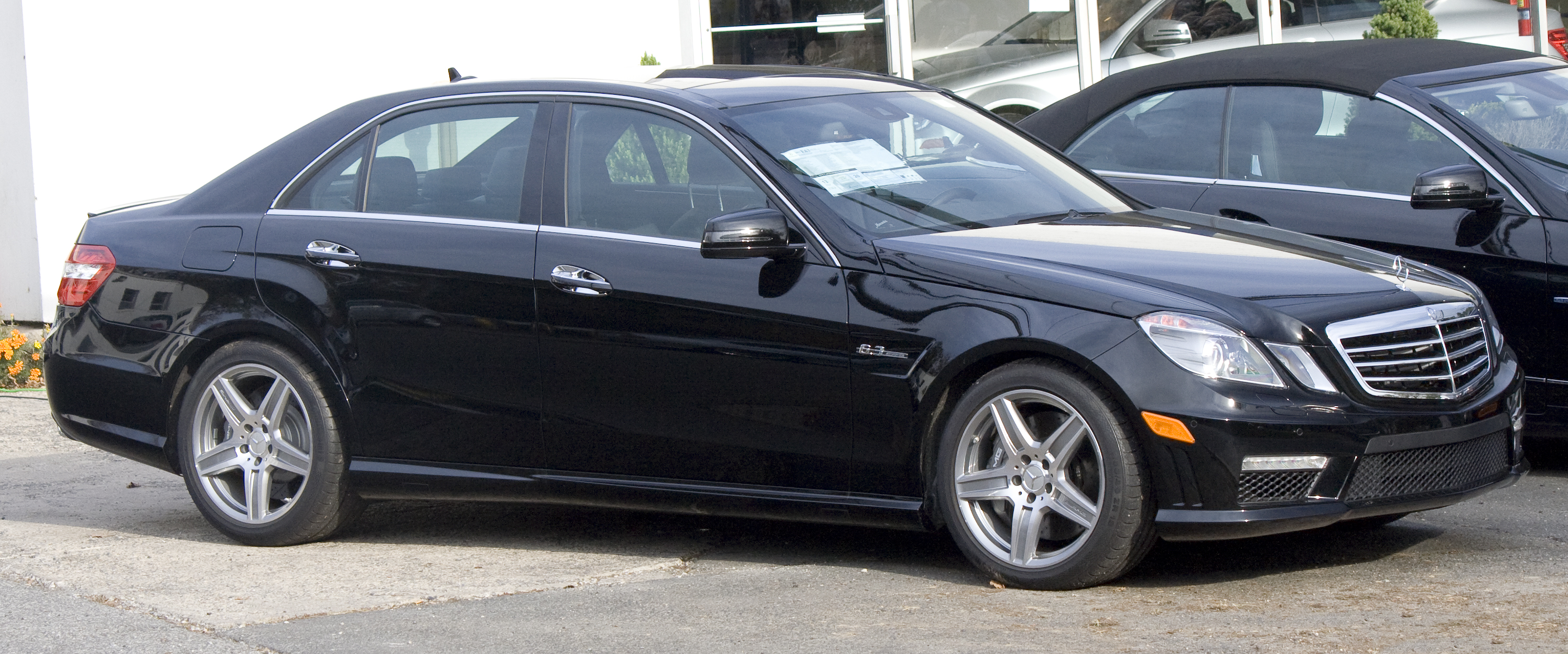 Mercedes E63 AMG